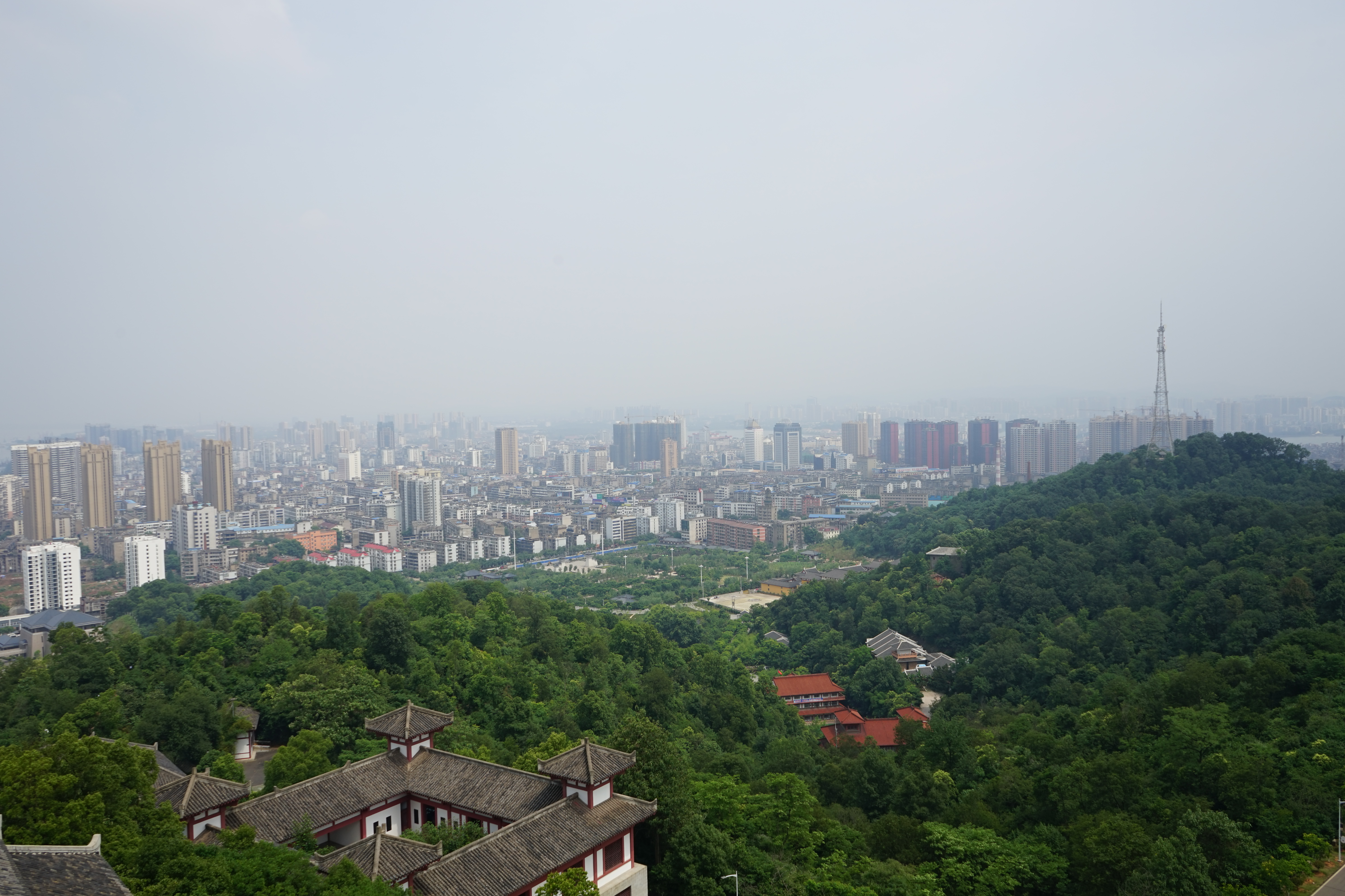 中文（中国大陆）: 鄂州西山武昌楼东望市区